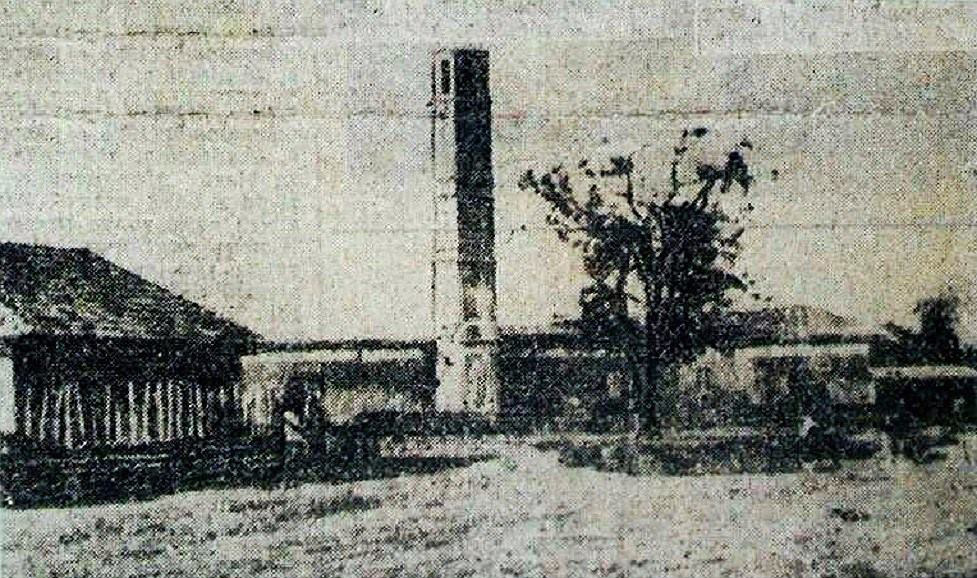 Нохчийн: Гелдганахь хилла маьждиг (1856 - 1857)